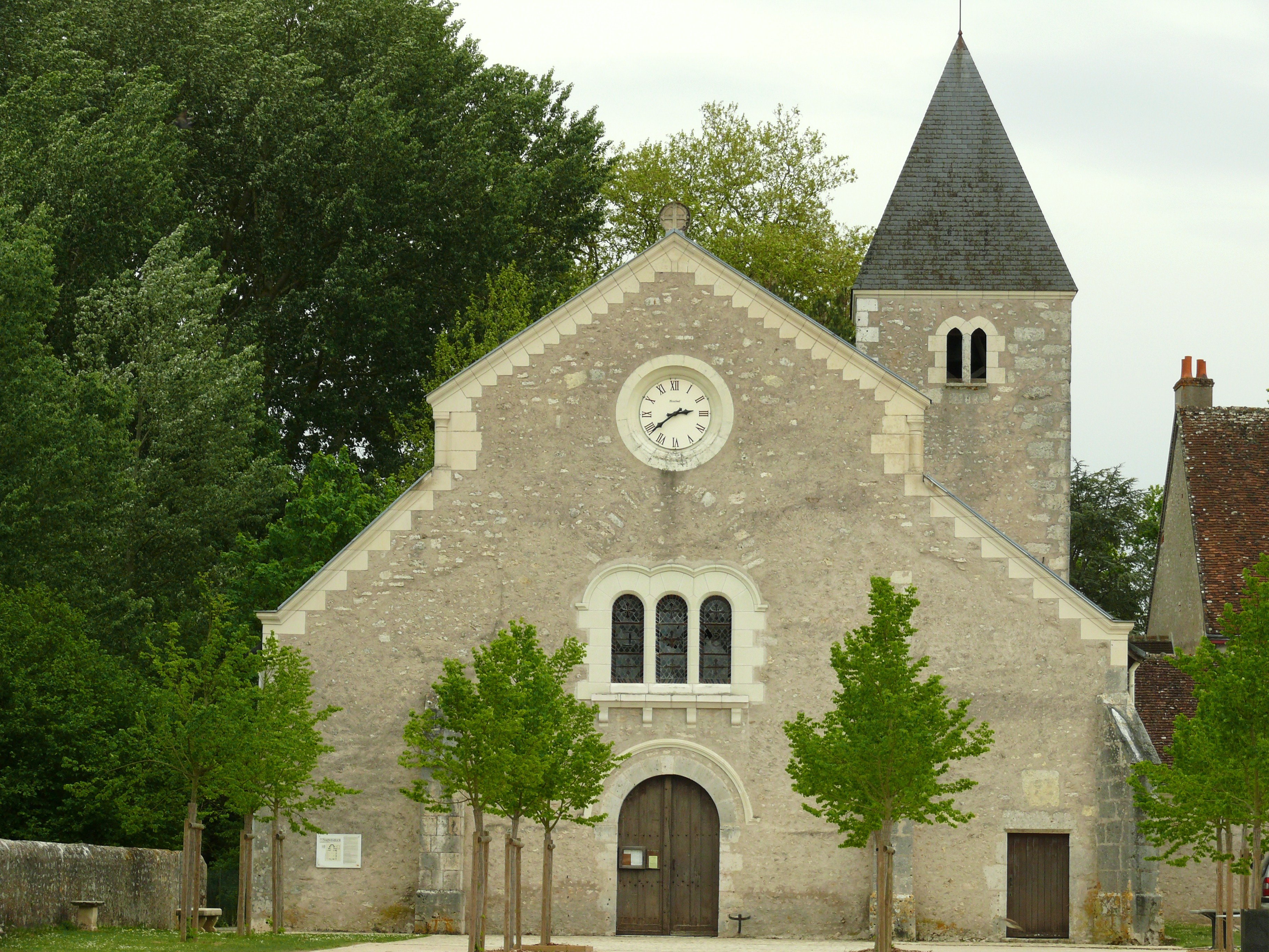 Fougères-sur-Bièvre - Eglise Saint-Eloi - Façade principale